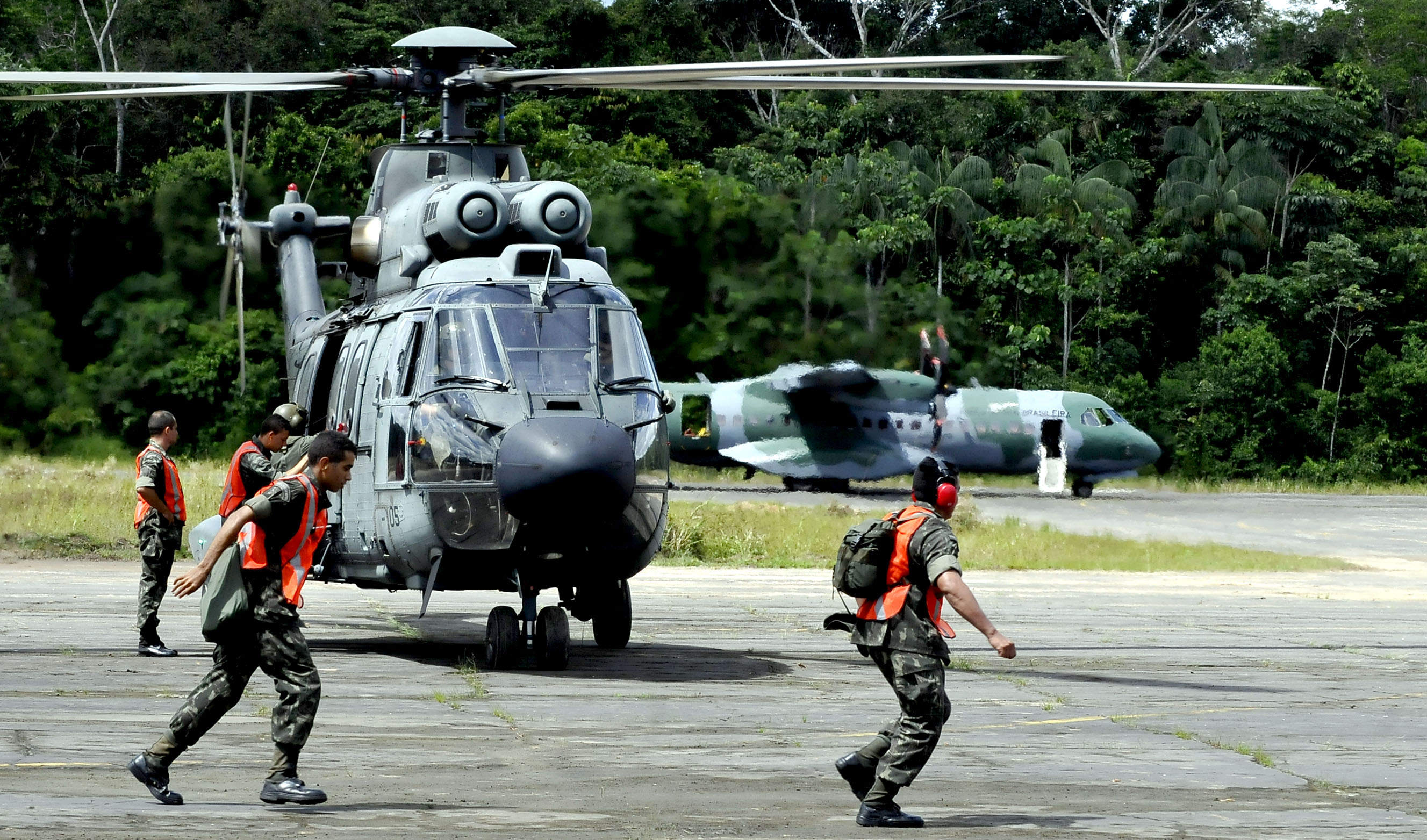 Foto: Jorge Cardoso